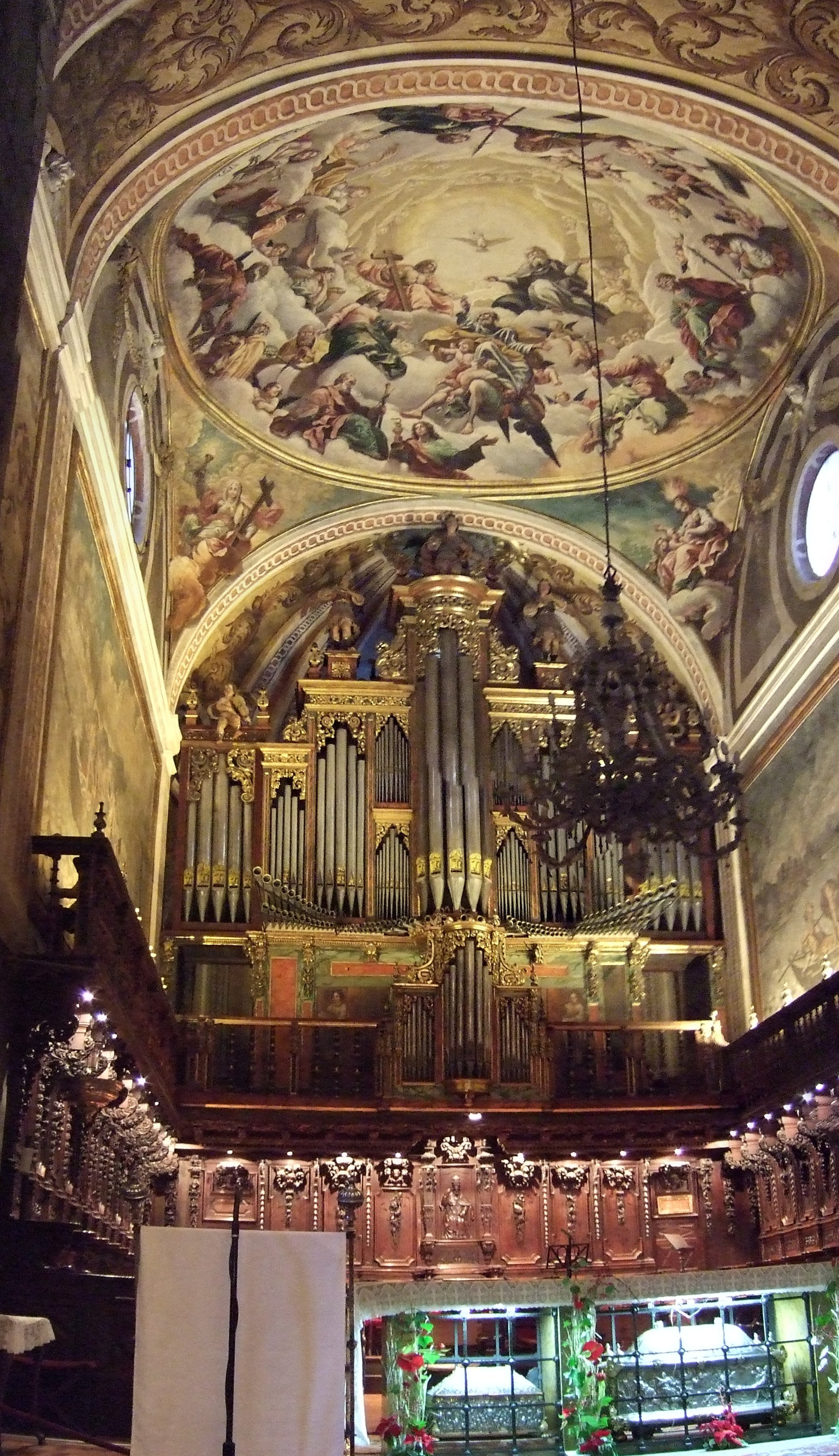 Jaca - Catedral - Interior - Coro